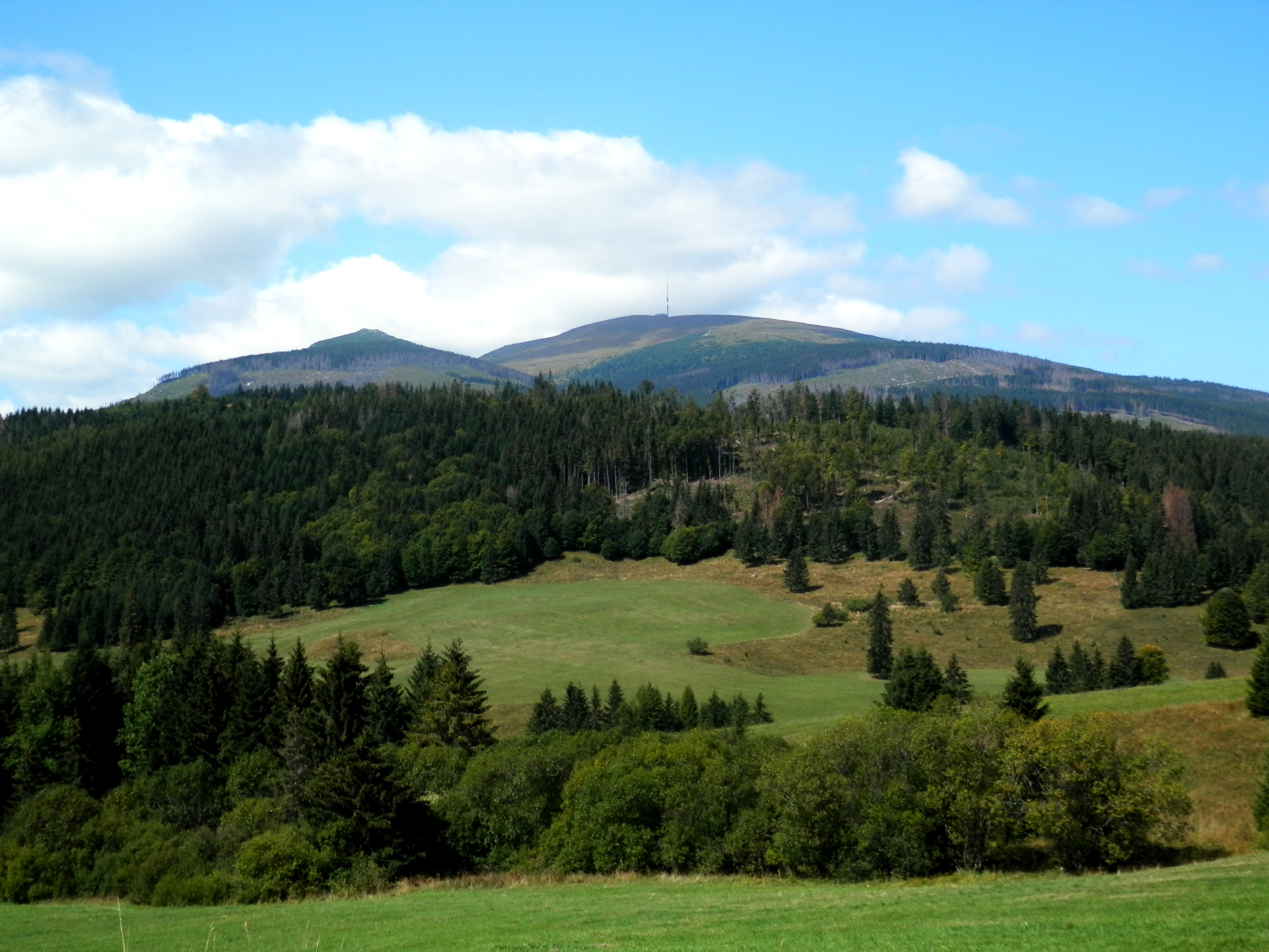 Pohľad na Kráľovu hoľu v Nízkych Tatrách, vysokú 1946 metrov nad morom. Sedlo Besník. Horehronská obec Telgárt, okolitá príroda. Okres Brezno, Slovensko.